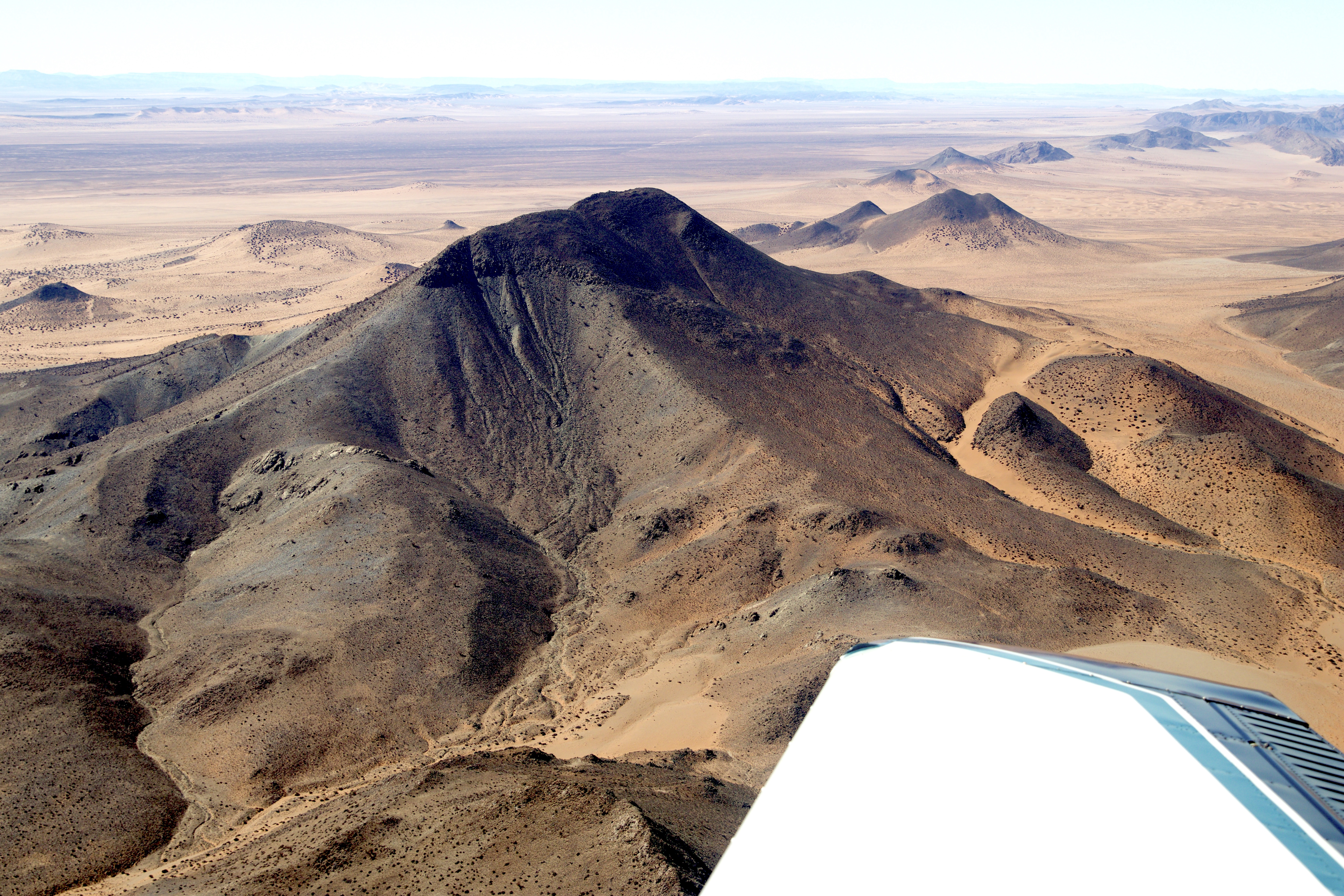 Höchster in den Klinghardtbergen Luftaufnahme 2018